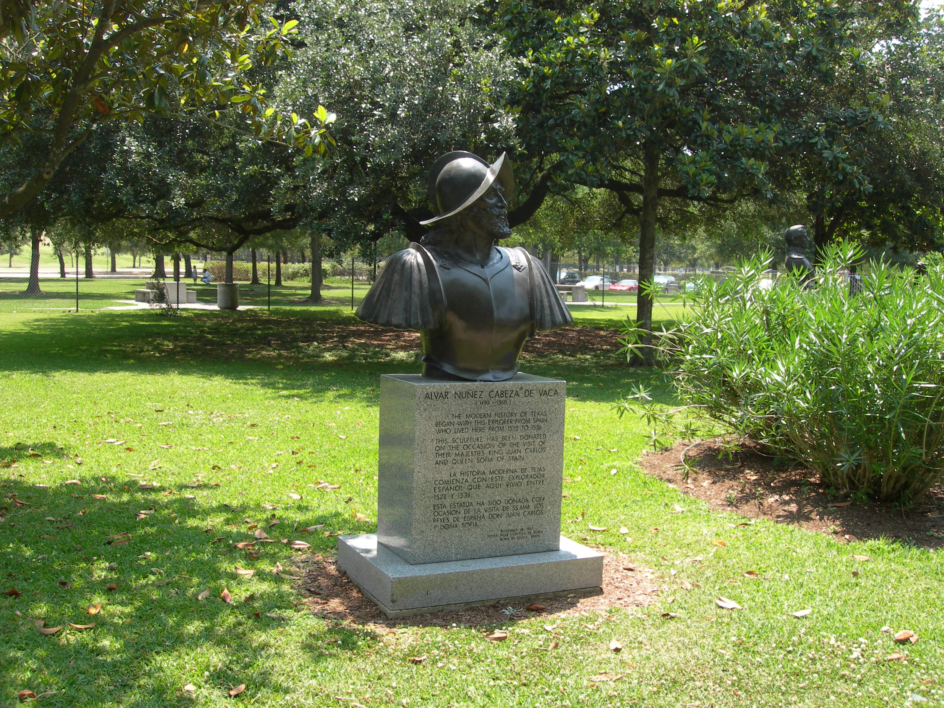 Statue of Alvar Nuñez Cabeza de Vaca, Houston TX